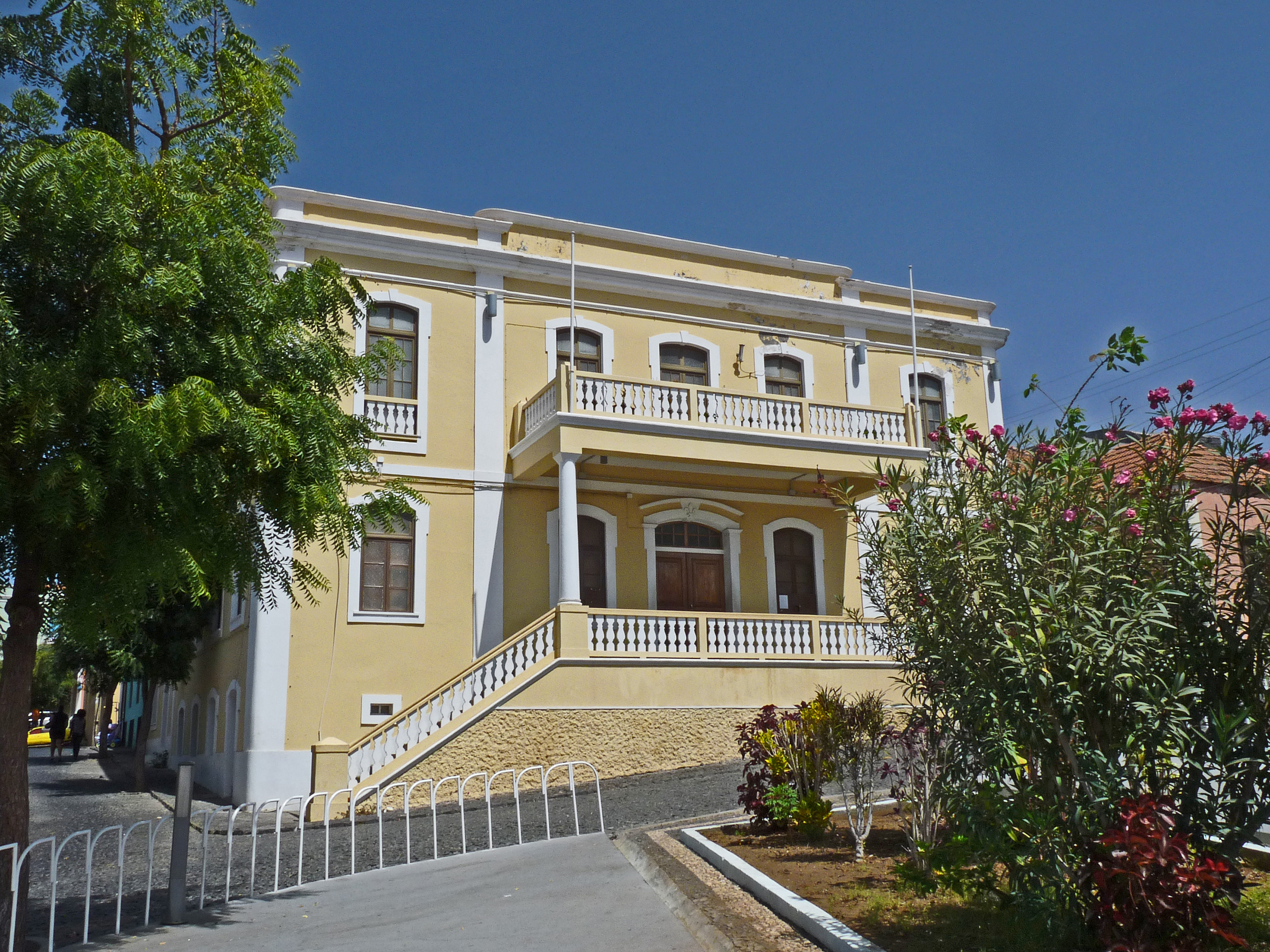 São Filipe (île de Fogo, Cap-Vert) : hôtel de ville